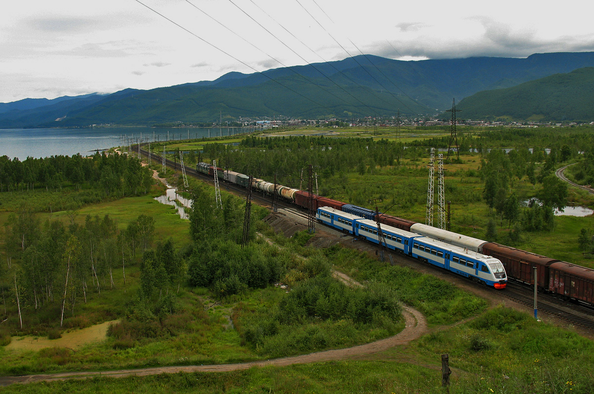 Дизель-поезд РА2-015 и грузовой поезд Россия, Иркутская область, перегон Слюдянка-I - Слюдянка-II